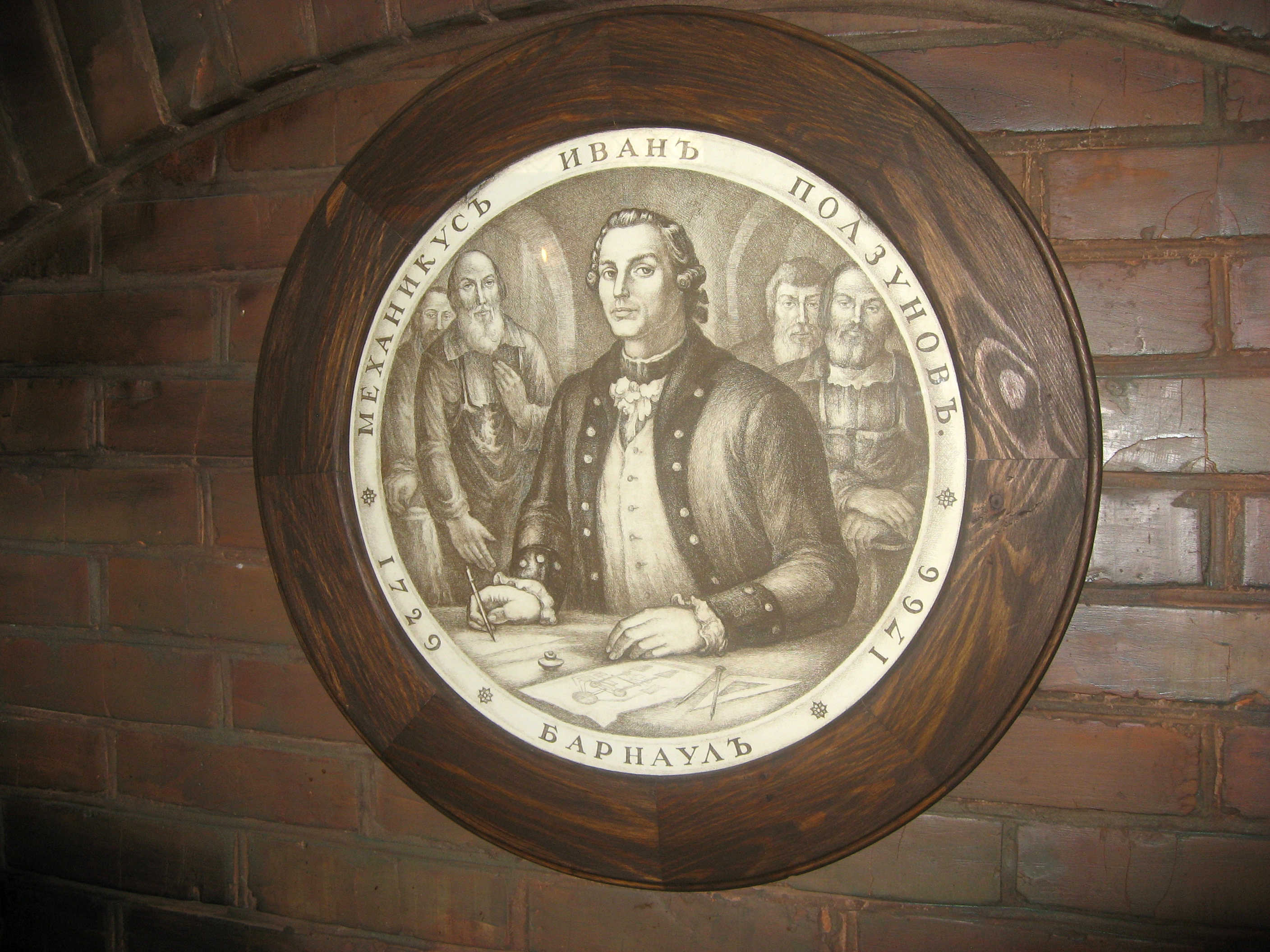 Bildnis von Ivan Polsunow (1728 - 1766), Polsunow-Restaurant in Barnaul